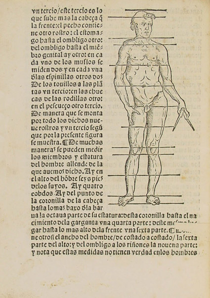 Tabla de proporciones del cuerpo humano. Ilustración de "Medidas del romano" de Diego de Sagredo.